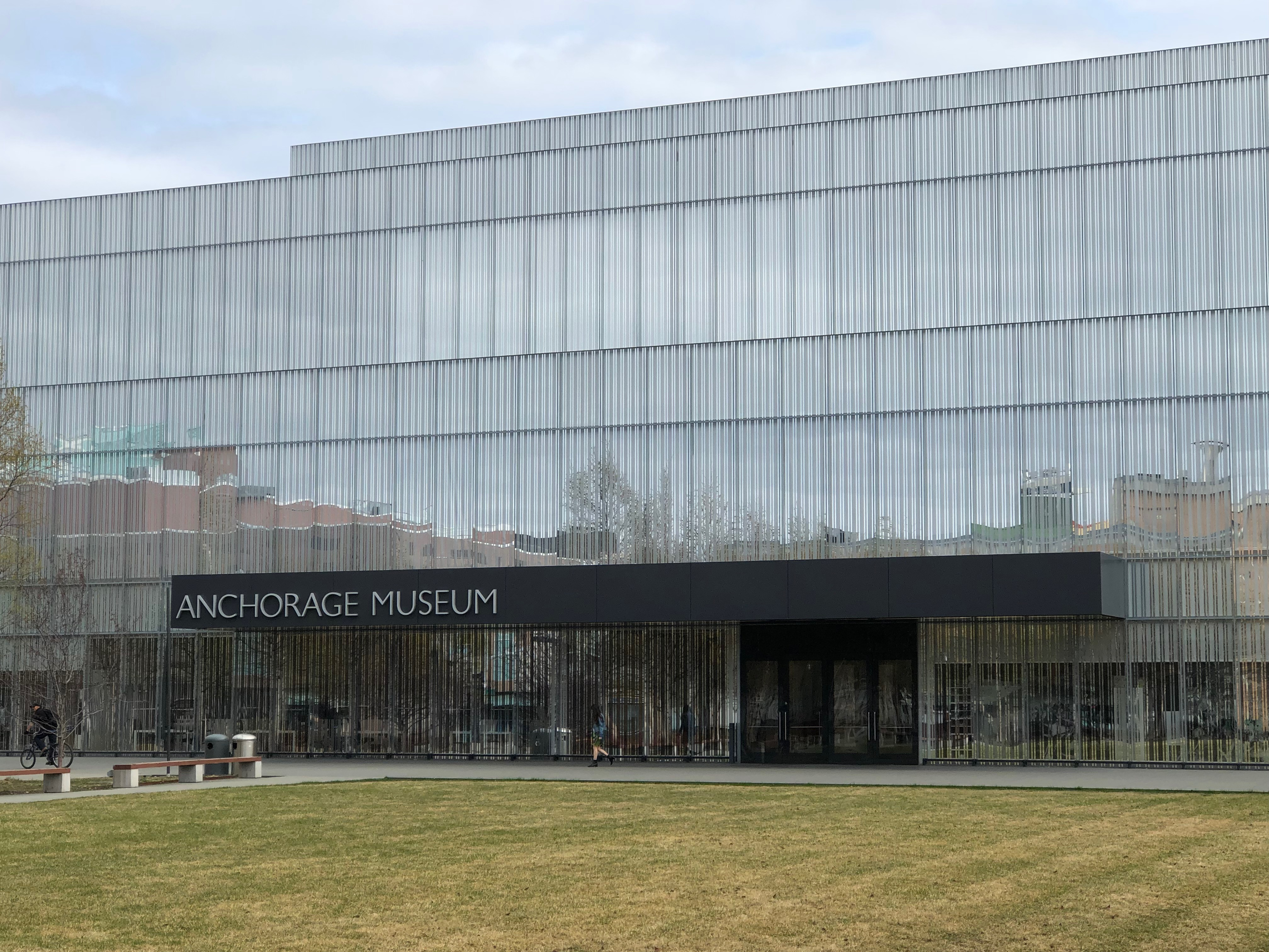 Anchorage Museum